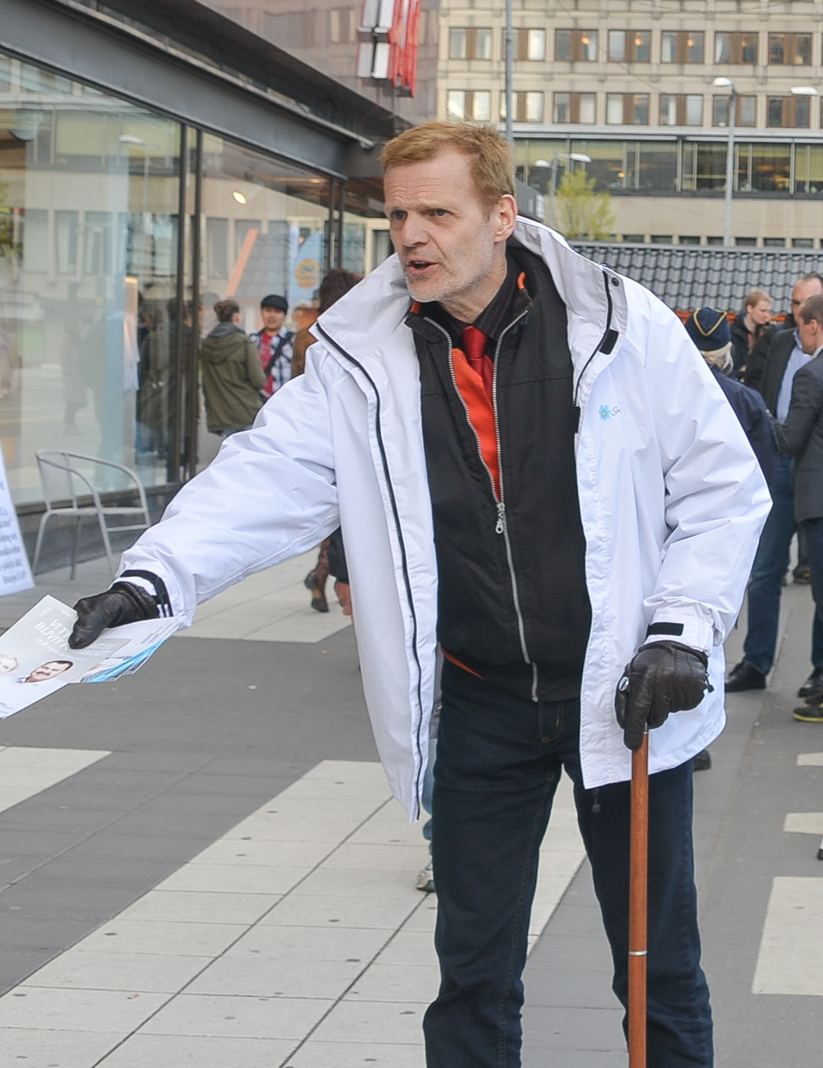 Rickard Wall i valkampanjen inför valet till Europaparlamentet i maj 2014.